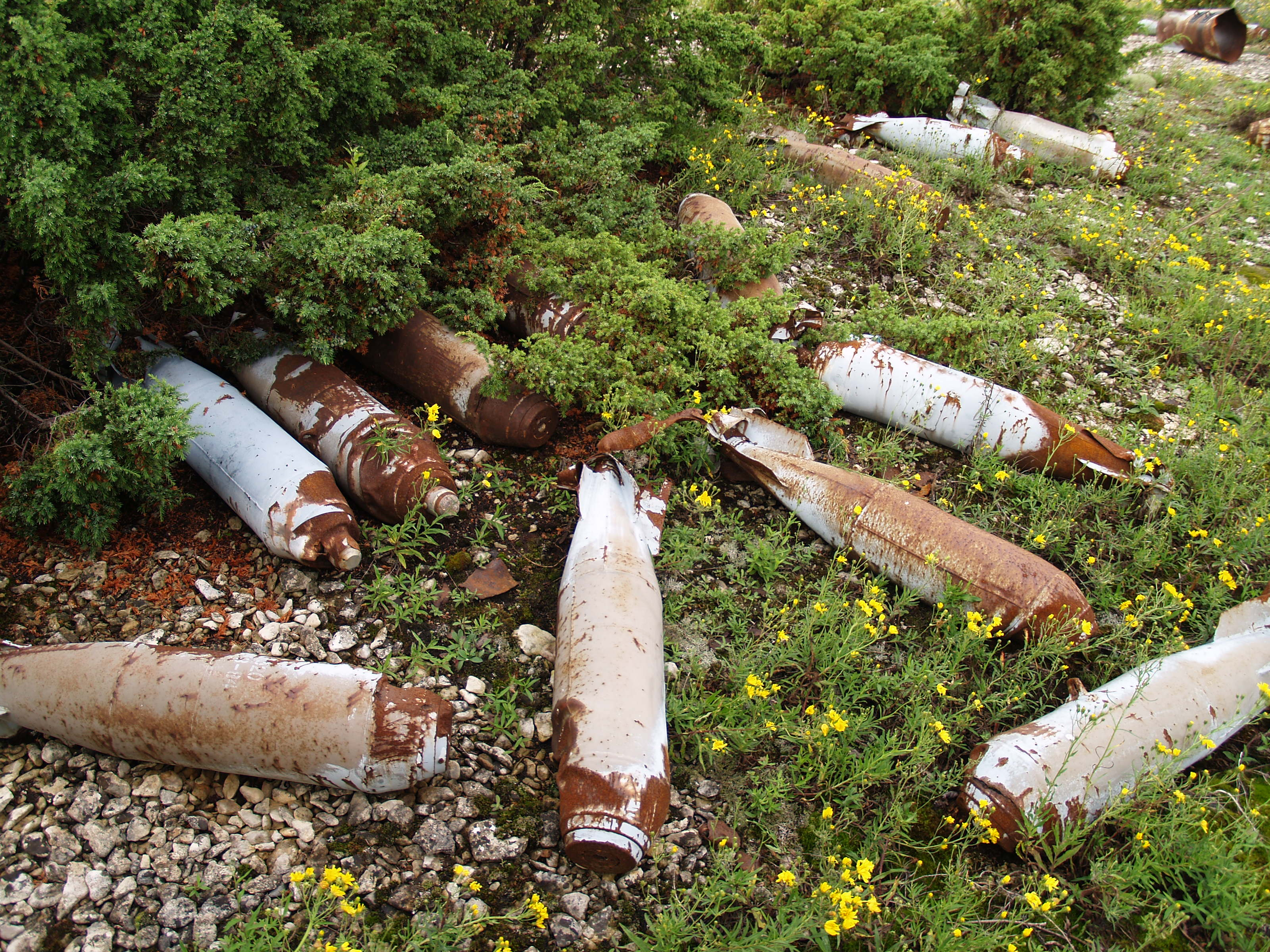 Suur-Pakril on endiselt leida arvukalt pommikestasid perioodist, mil saar oli NSV Liidu kaugpommitajate polügooniks.